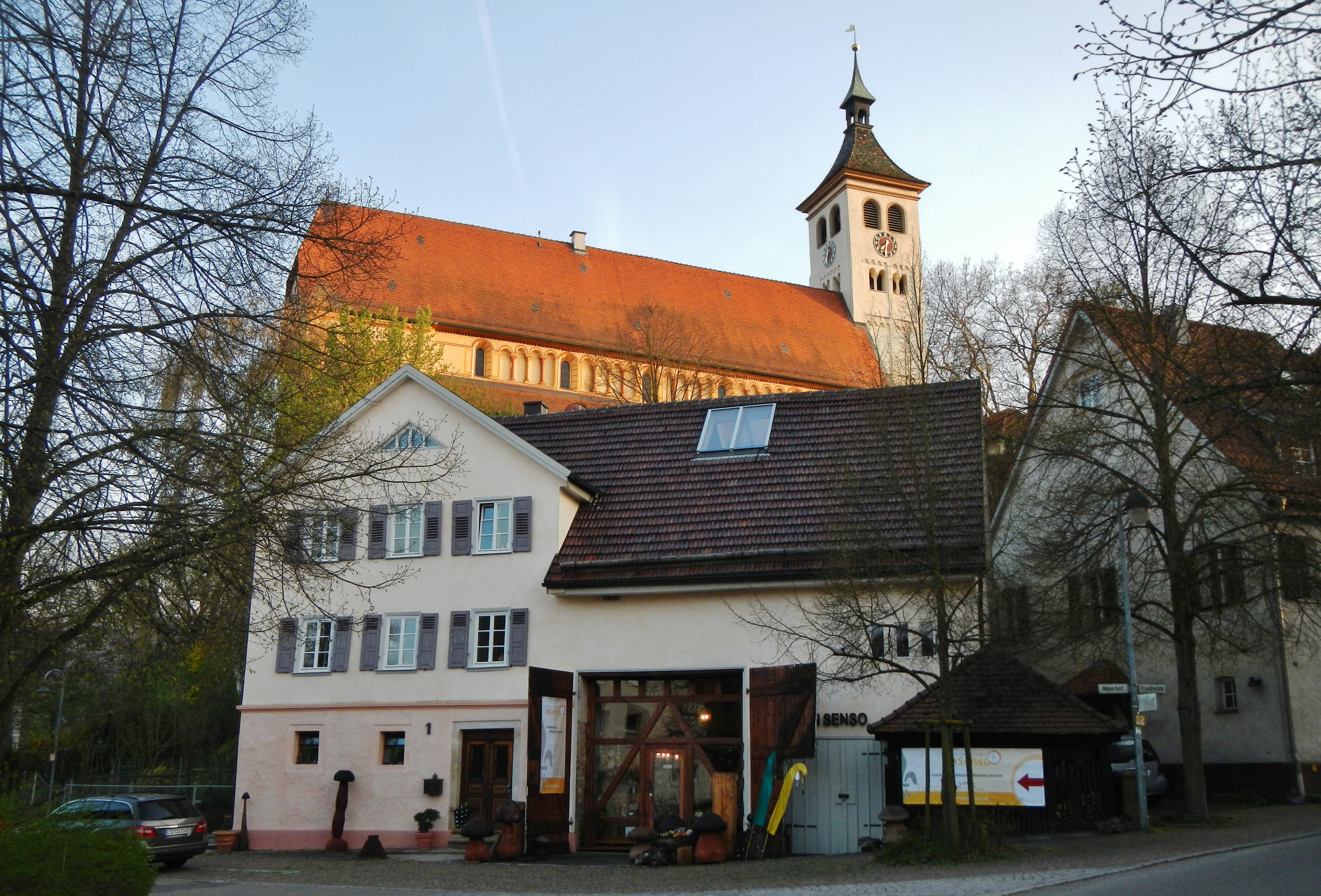 Bereich unterhalb des Kloster Denkendorf, von der Körschbrücke aus gesehen.